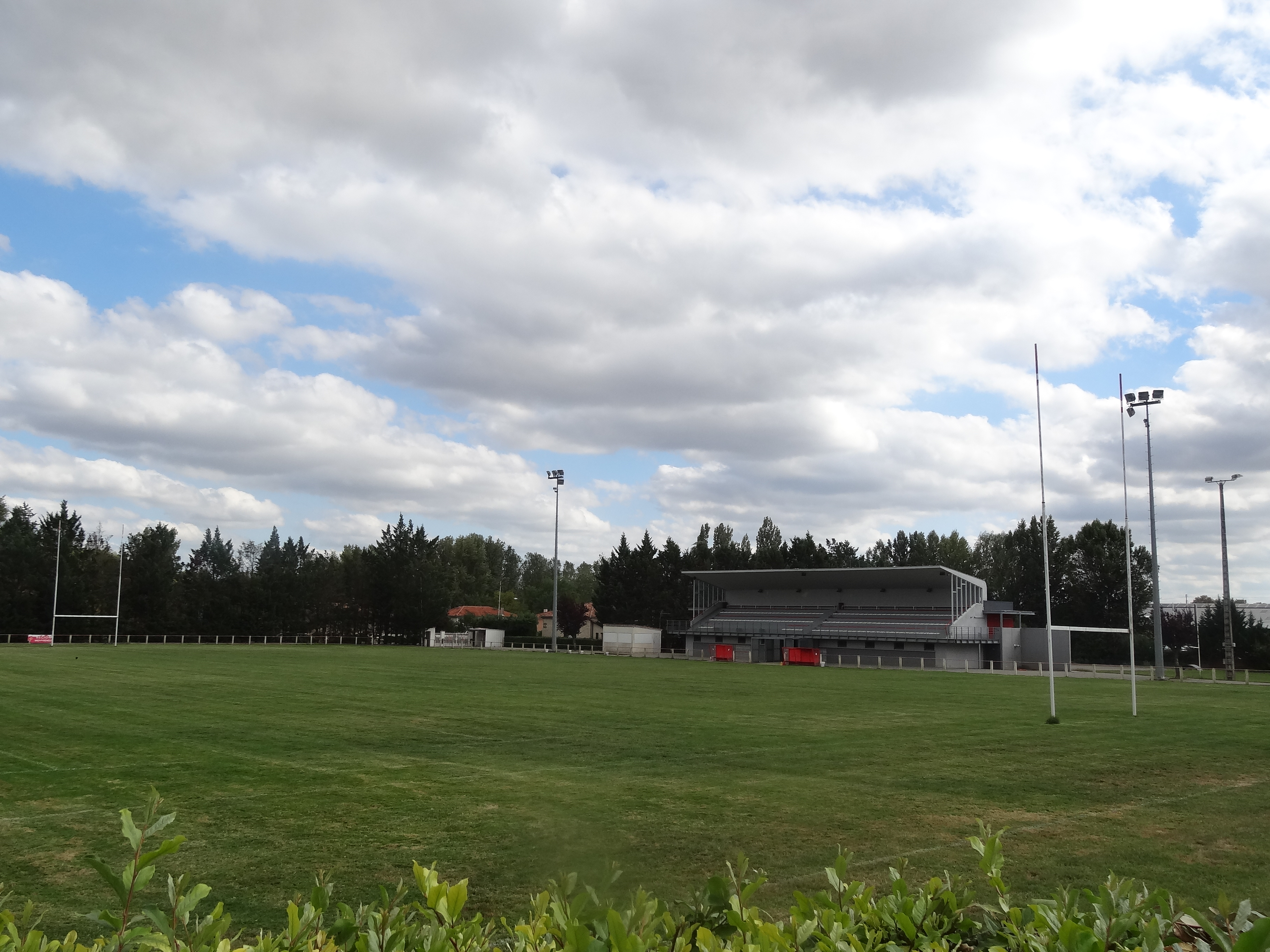 Terrain de rugby à Gimont.